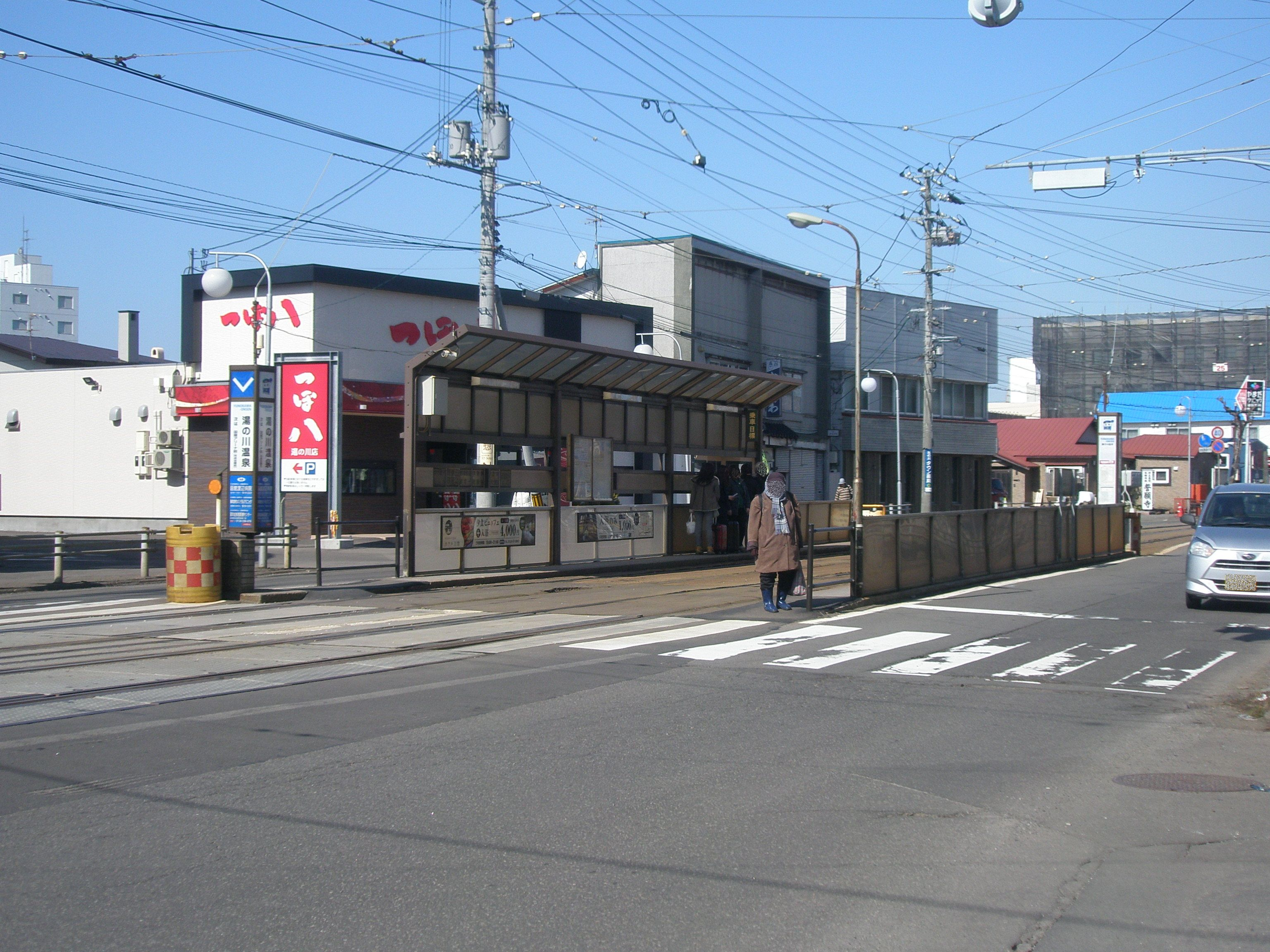 湯の川温泉停留場・全景（2018年3月24日撮影）